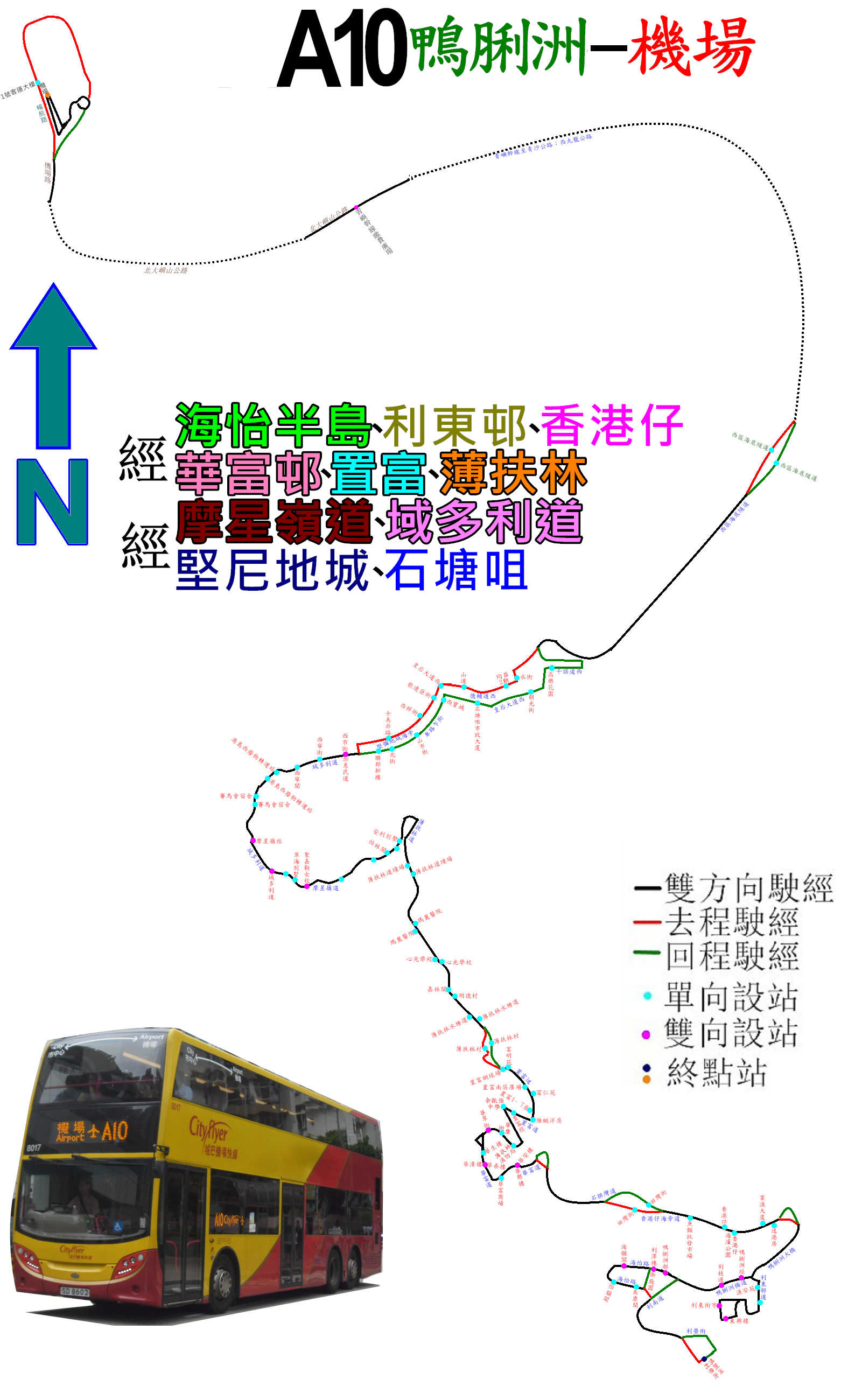 中文（香港）: 城巴機場快線A10路的走線圖